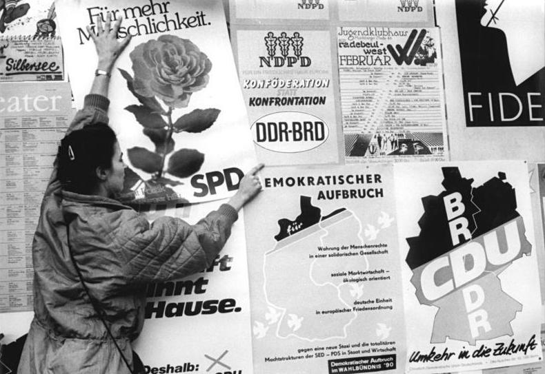 ADN-ZB Häßler 14.2.90 Dresden: Wahlkampf. Wer die Wahl hat, hat die Qual... An vollmundigen Sprüchen mangelt es derzeit jedenfalls kaum einer Partei. Ob sie nach dem 18.3. noch zu hören seien werden?